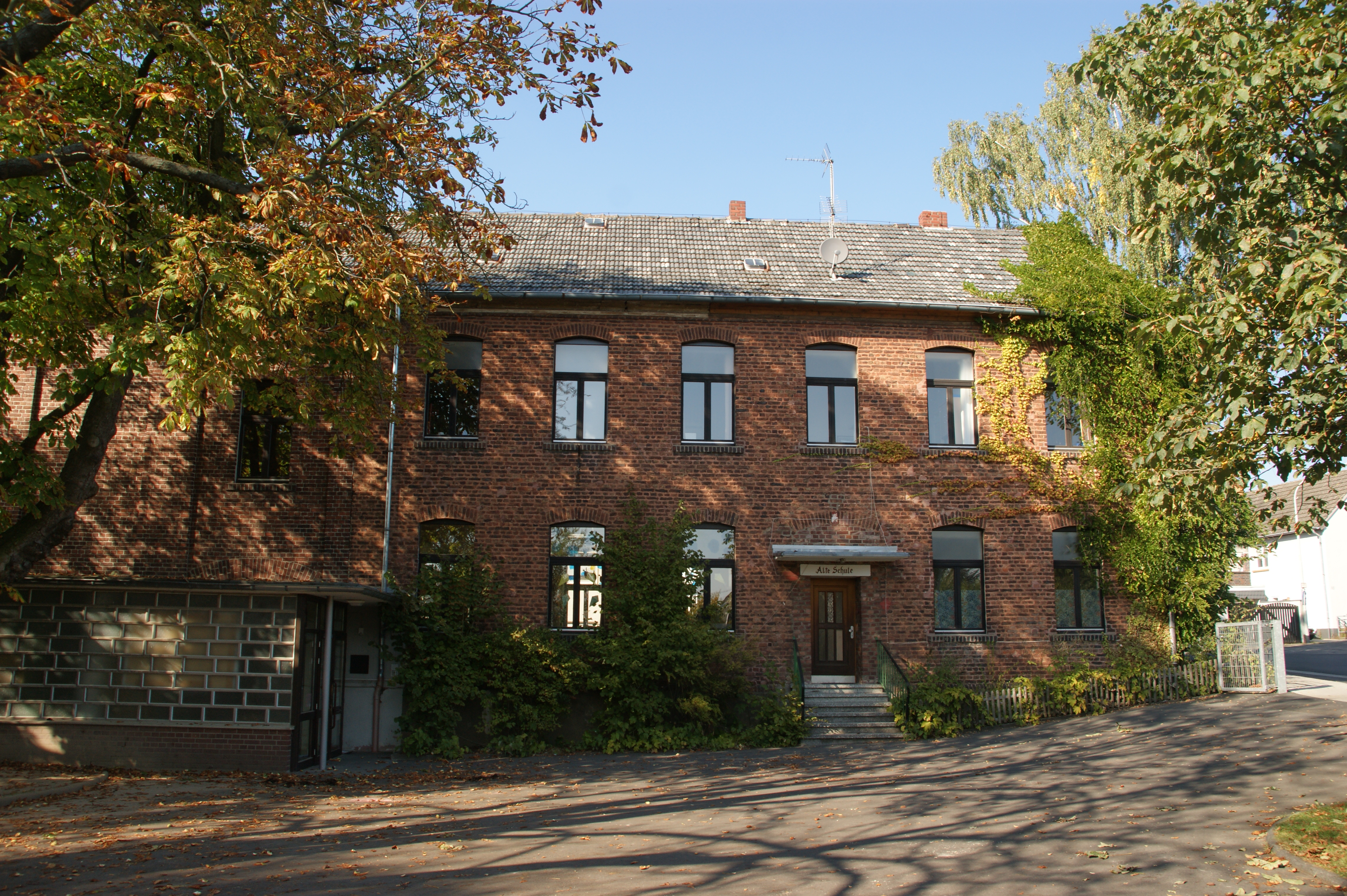 Alte Schule in Rauschendorf, Königswinter